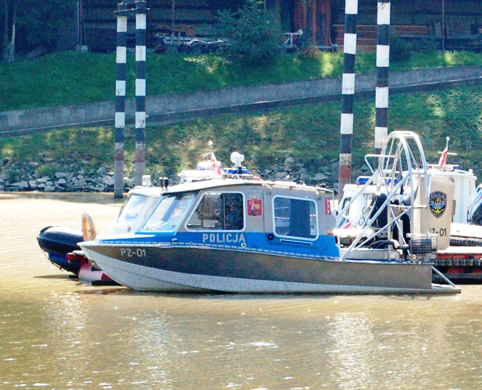 Hafen Praga, Warschau